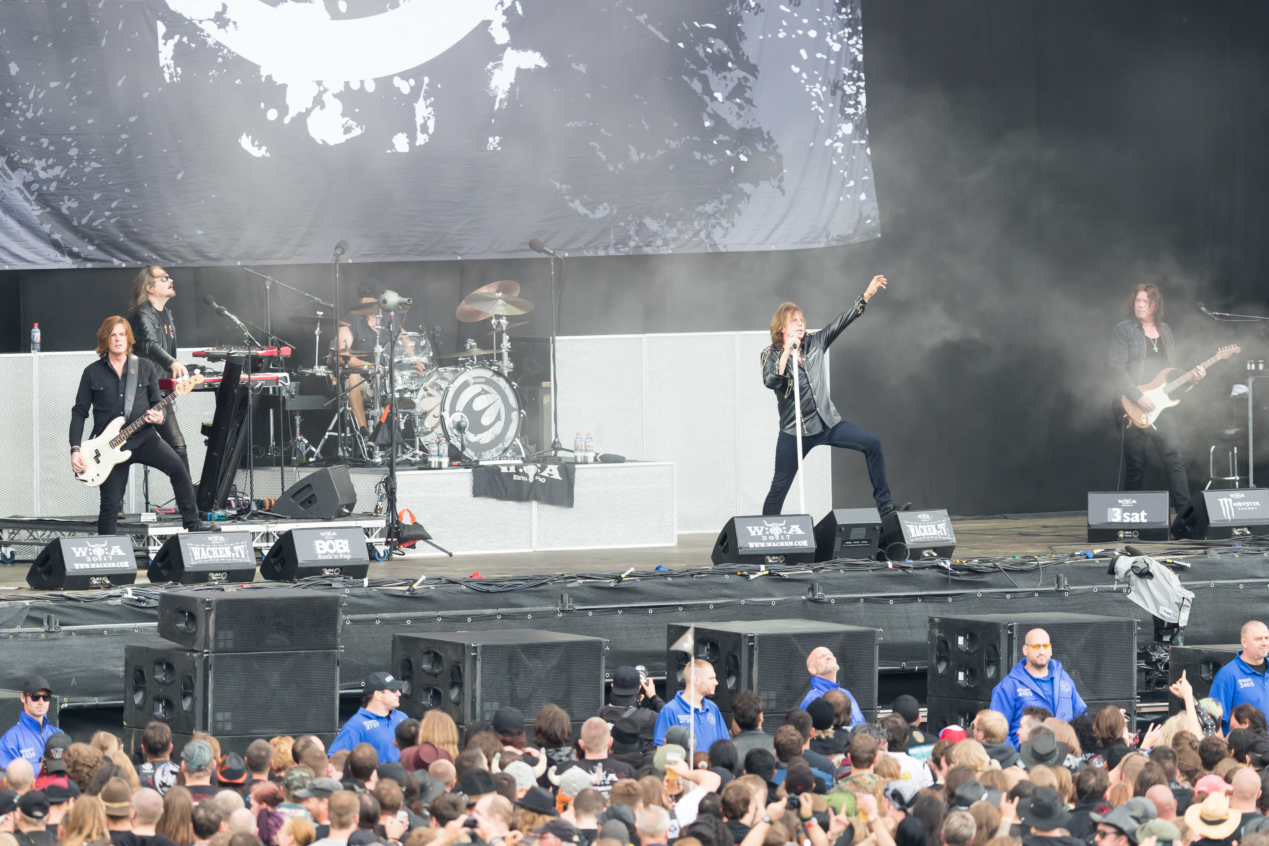 Europe during Wacken Open Air at Schleswig-Holstein, Wacken, , Germany on 2017-08-03, Photo: Sven Mandel